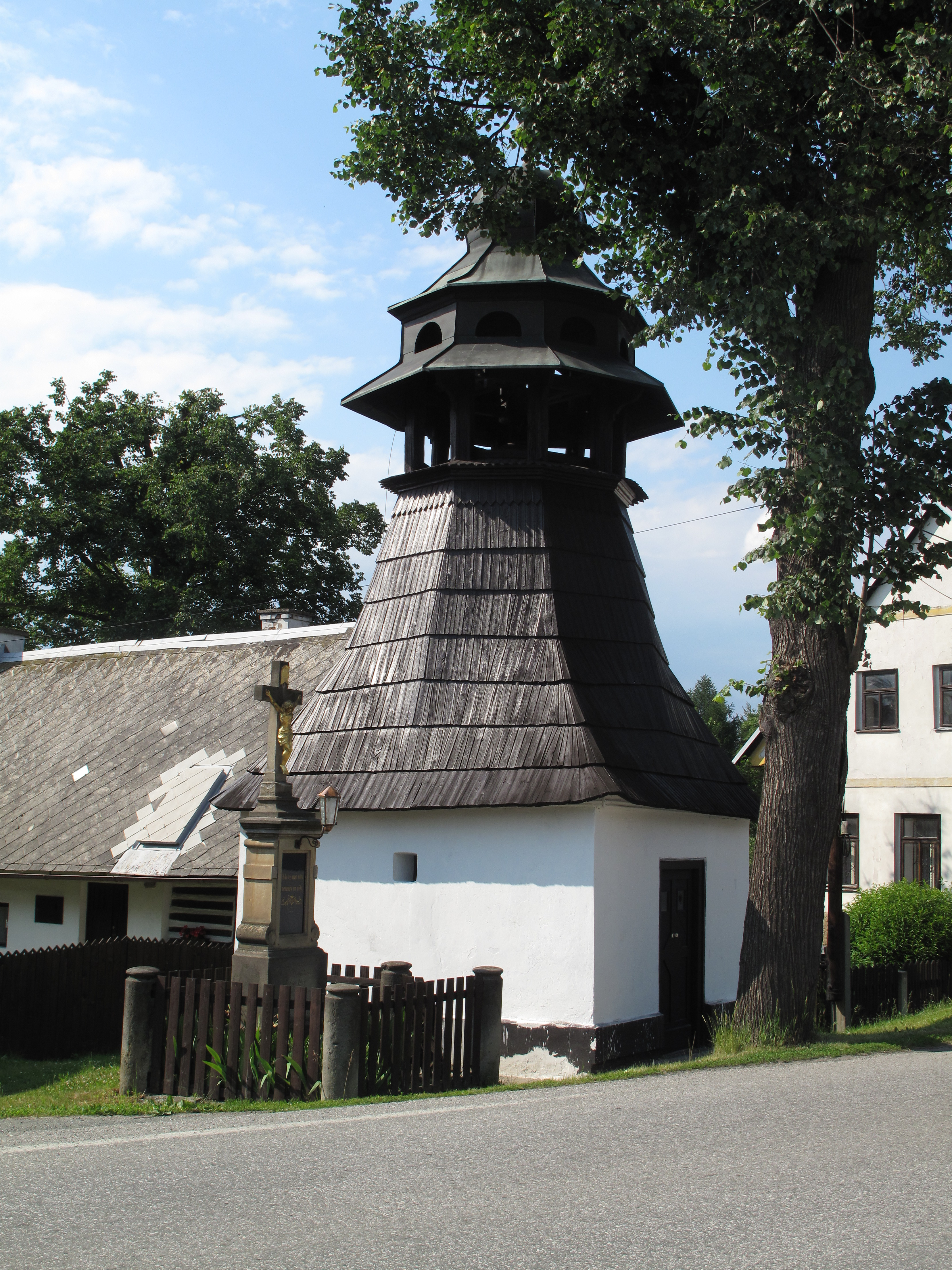 Červená Hora